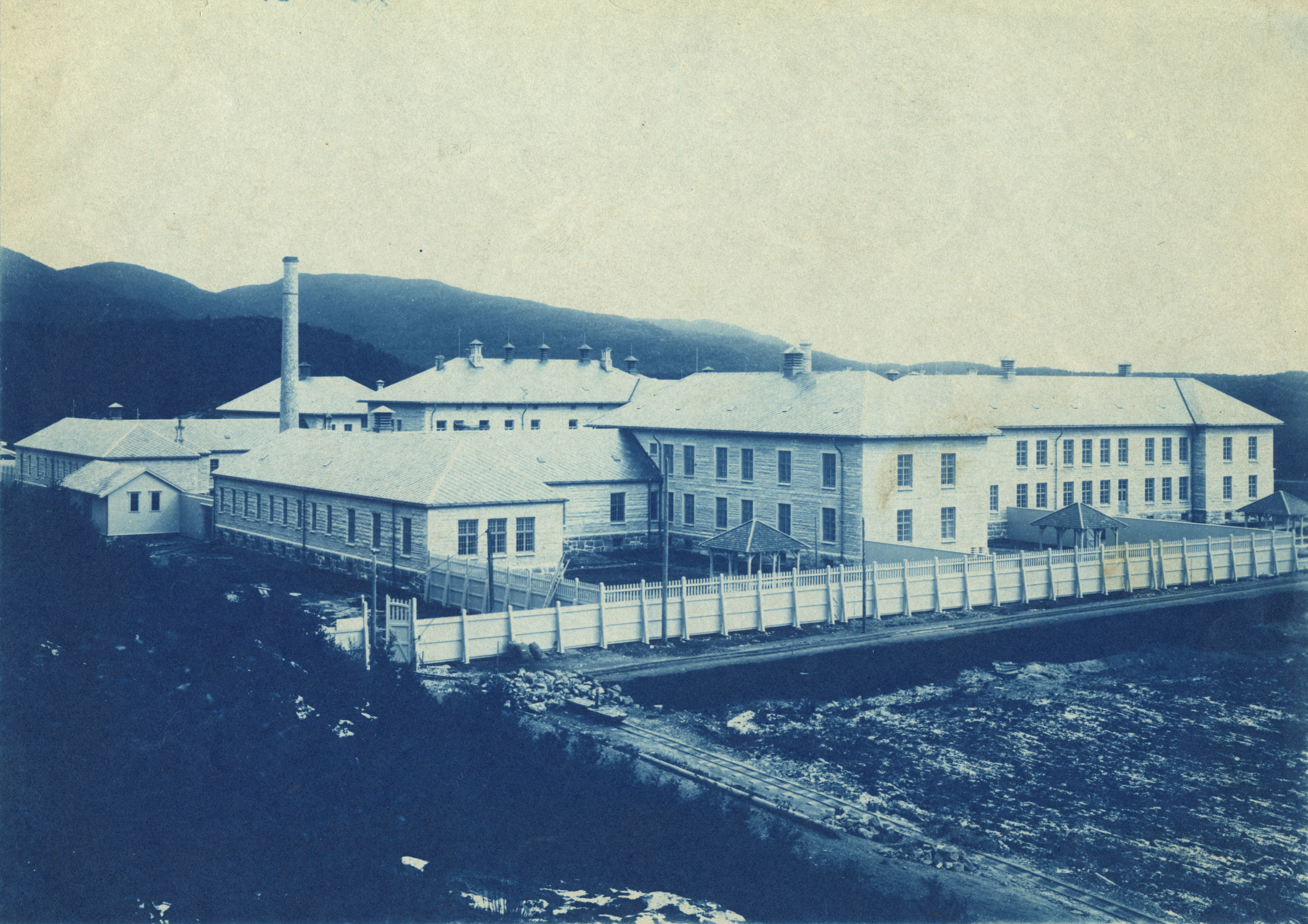 Rønvik Sindsykeasyl, Rønvik psykiatriske sykehus i Bodø, Nordland Rønvik sindsykehus ved Bodø.